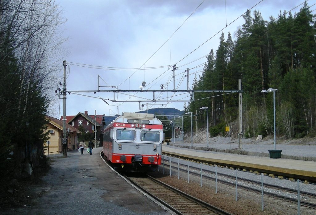 Harestua stasjon (i dag Monsrud kryssingsspor) med oppgradert mellomplattform i 2010